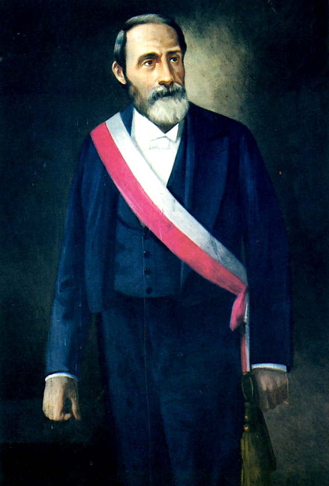 Manuel Costas Arce (1820 – 1883) político peruano. Fue Ministro de Gobierno y Presidente del Consejo de Ministros de agosto a octubre de 1864, durante la crisis con España. Miembro del Partido Civil, acompañó al presidente Manuel Pardo como primer vicepresidente de la República y en tal calidad ejerció la presidencia interina del Perú de noviembre de 1874 a enero de 1875